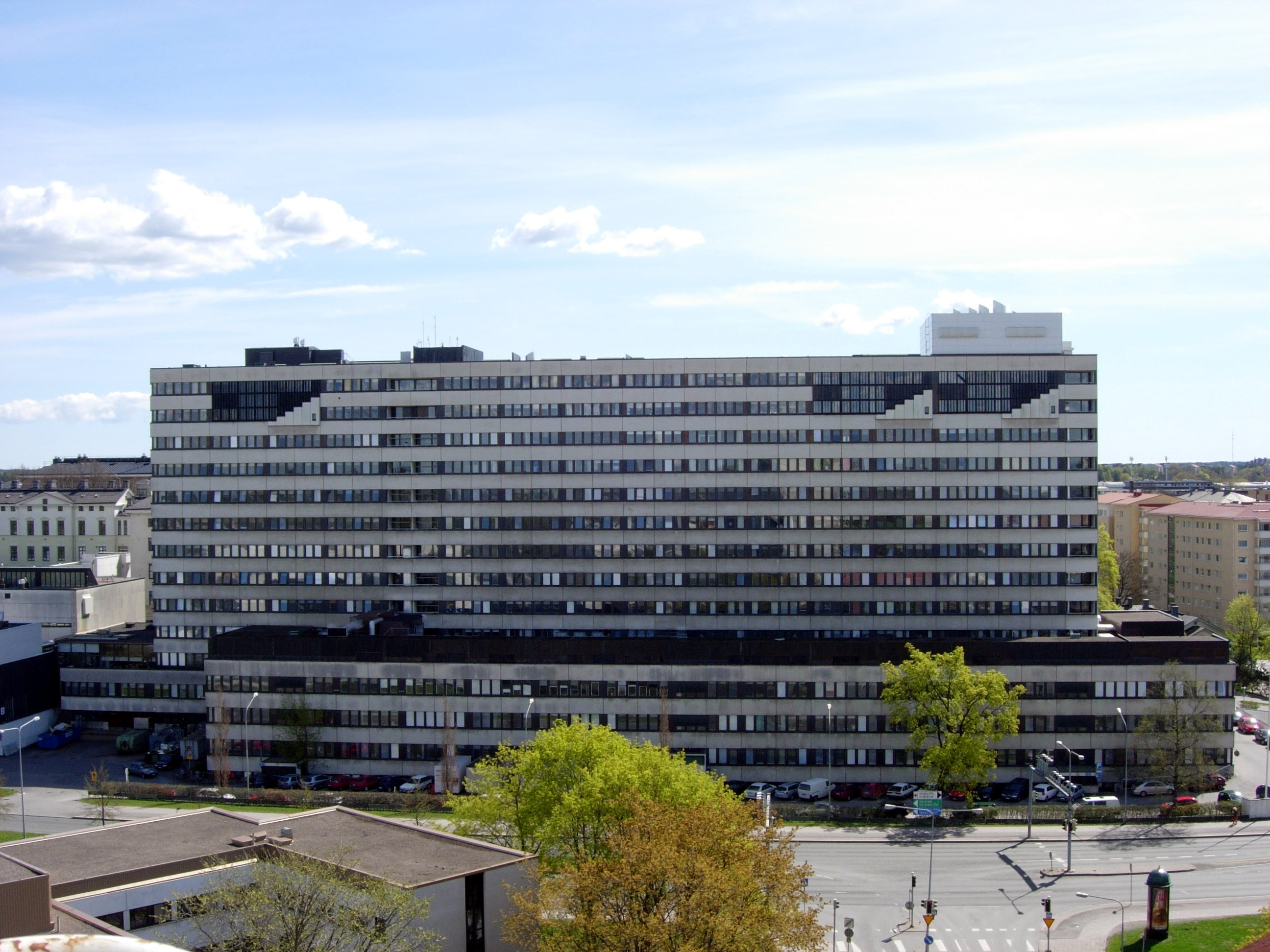 Turun yliopistollinen keskussairaala, U-sairaala. Martta ja Ragnar Ypyä, 1955–1968.